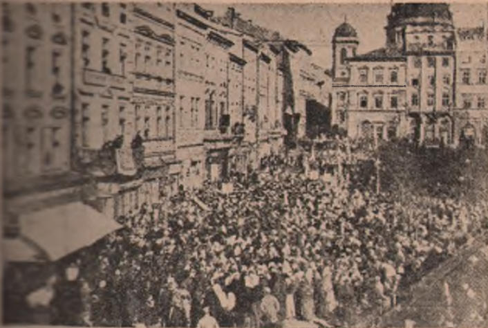 ■ ■ Н І берестейського миру у Л ьвові 3. б е р е з н я '1918 р. Святочний похід зібраний на львівському ринку витлухнє промов.